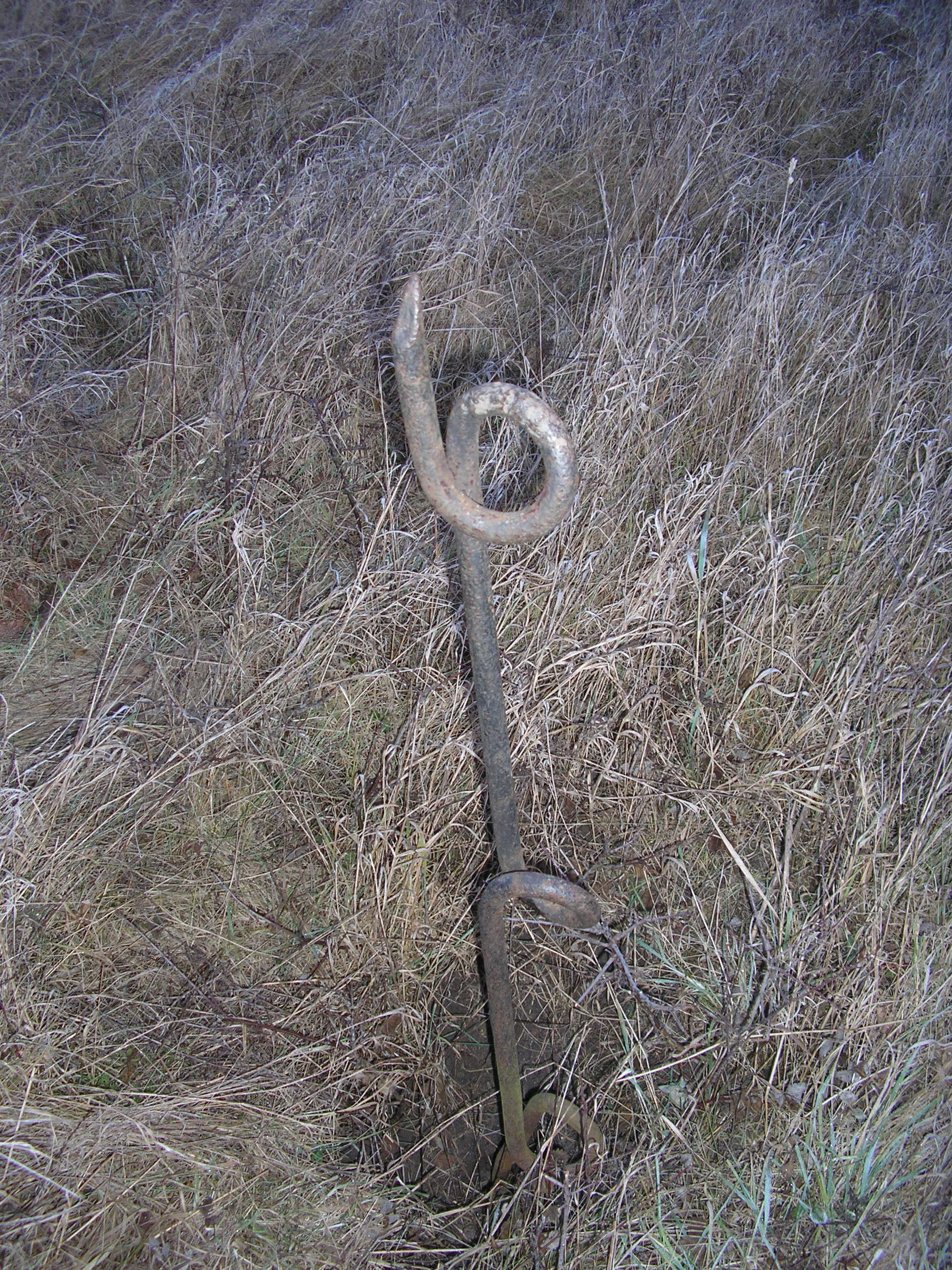 Praseci ocasek